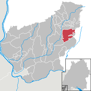 Häg-Ehrsberg, Landkreis Lörrach, Baden-Württemberg